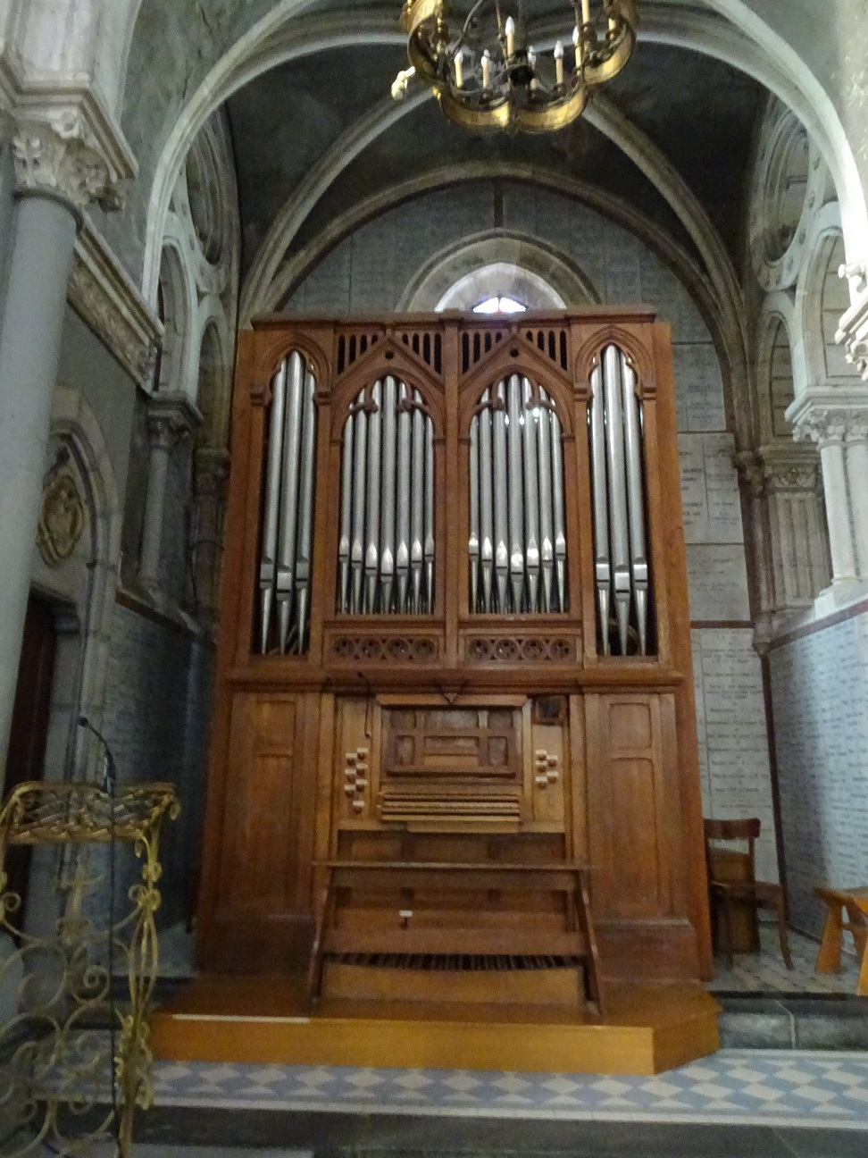 Orgue de choeur de la basilique de l'Immaculée-Conception de Lourdes